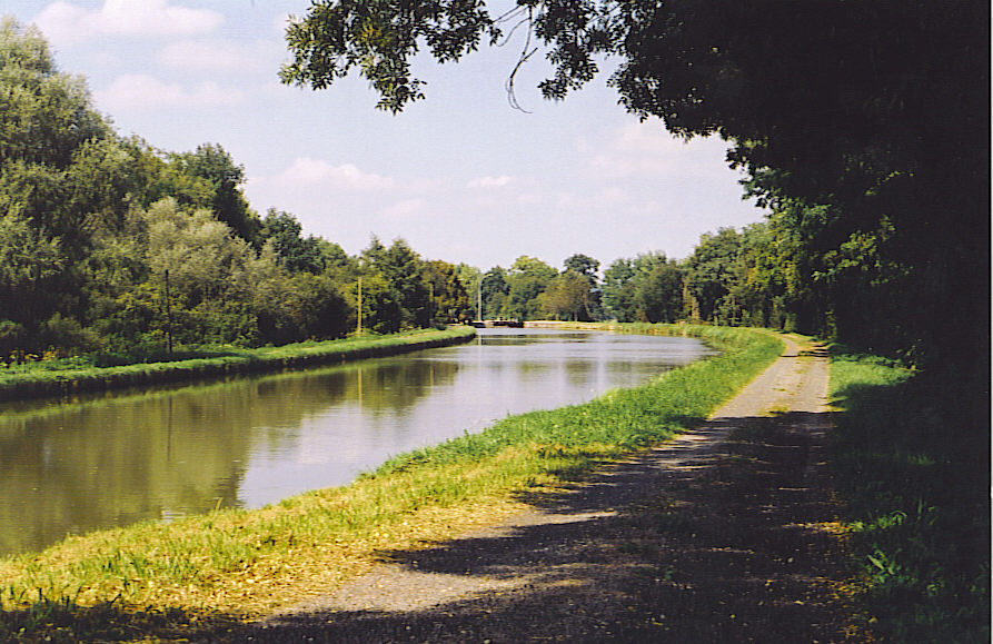 propre photo